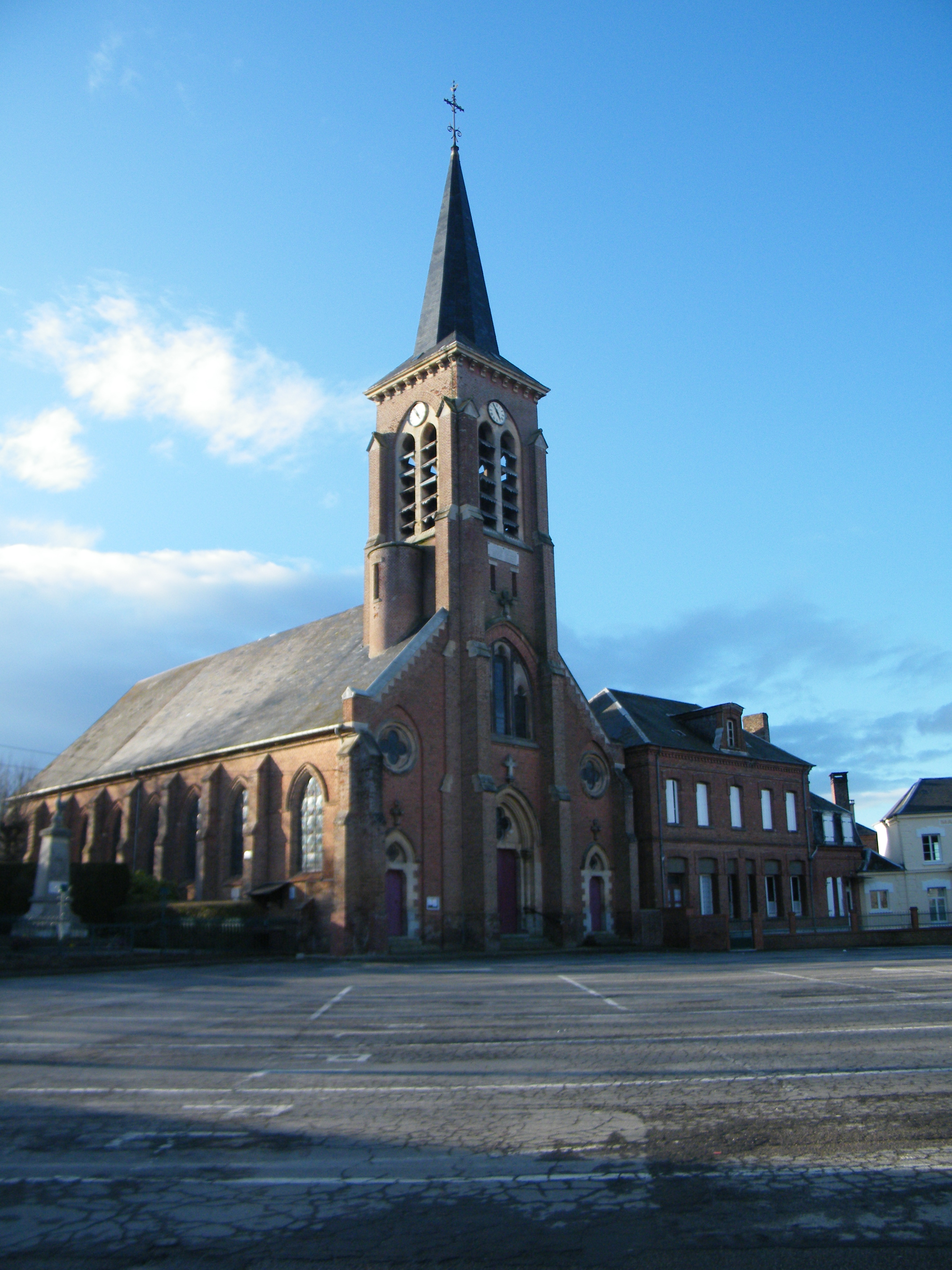 L'église.